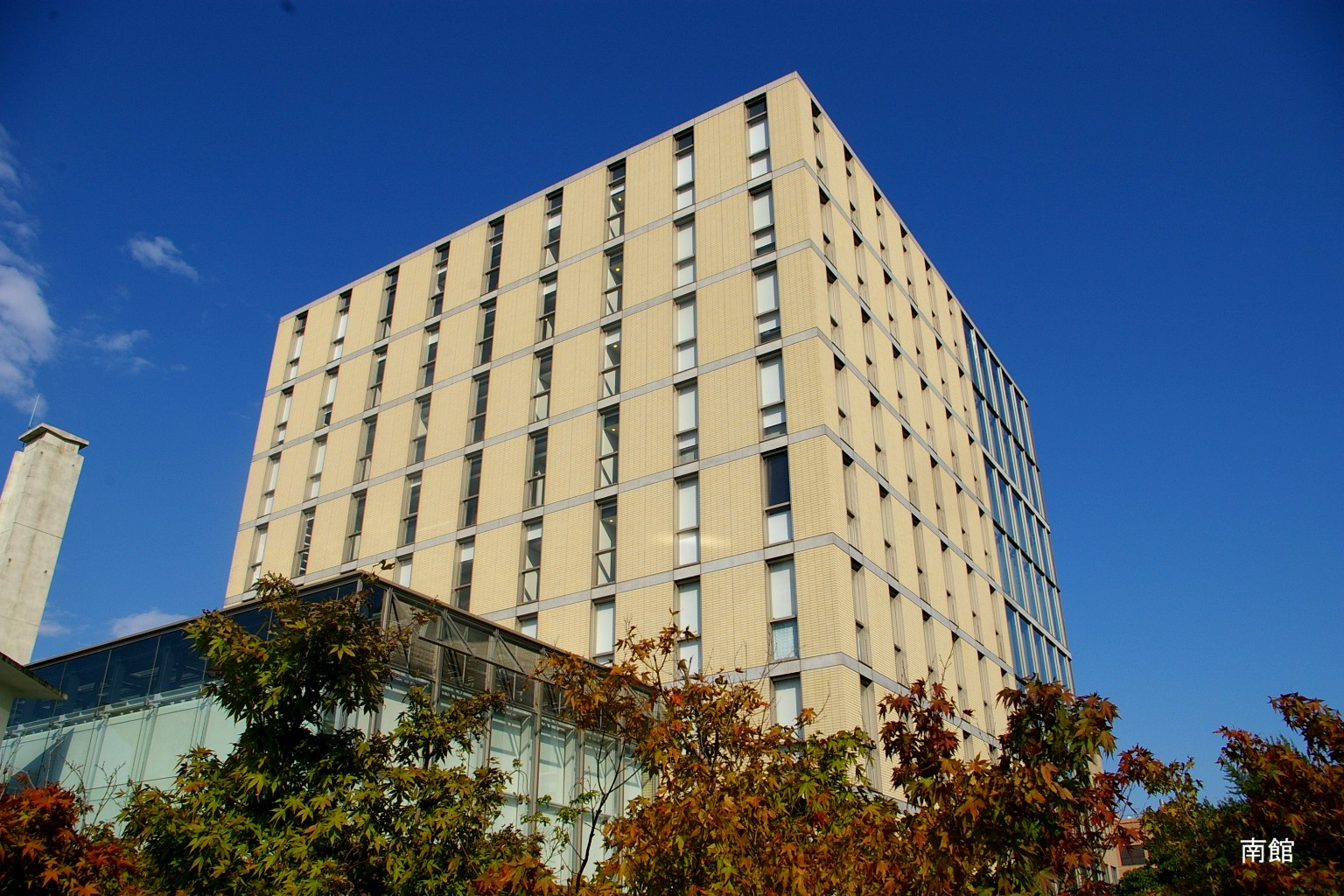 2009.5日本国内で塾生 (talk)が撮影。